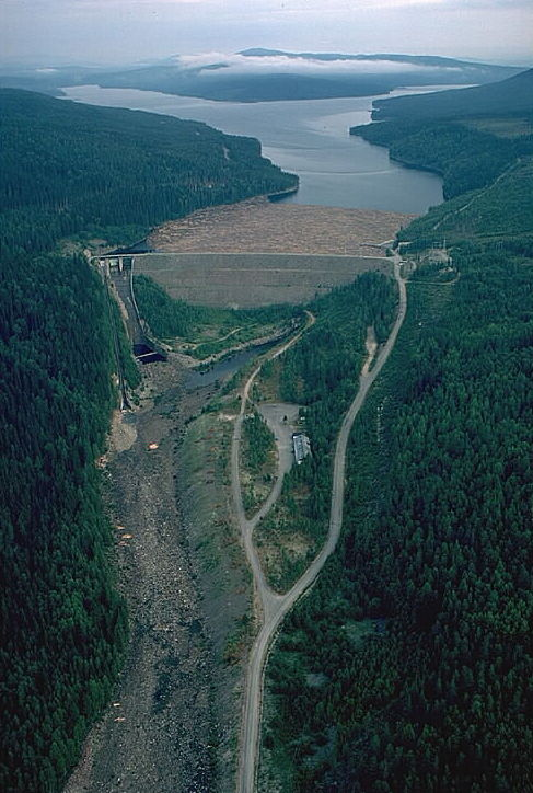 Kraftverksdamm i Klarälven. Bilden troligen från mitten av 1980-talet. Motiv: Höljes kraftstation Nyckelord: Flygbilder Kategori: Kraftverk Kraftverksdamm i Klarälven. Bilden troligen från mitten av 1980-talet.